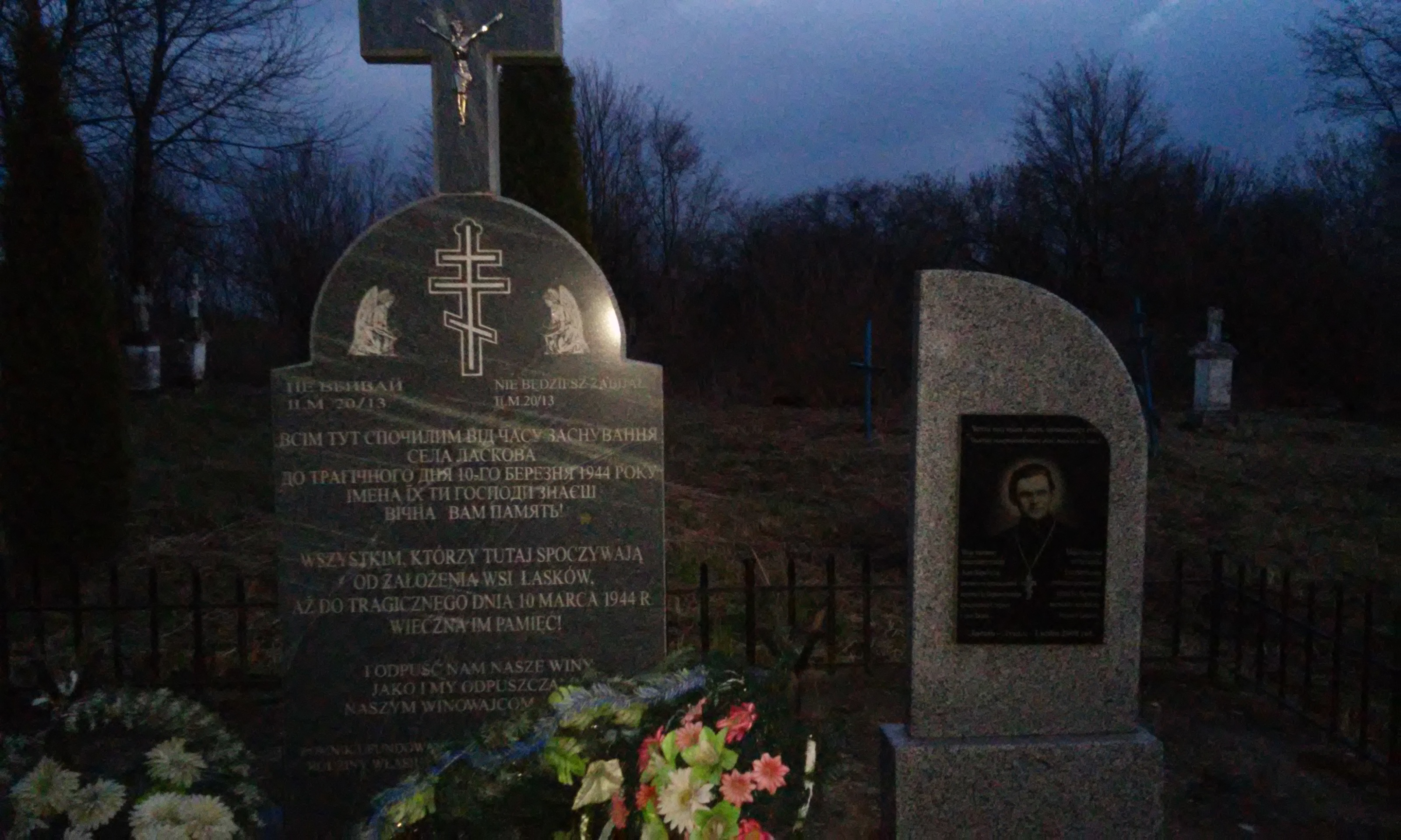 Pomnik zmarłych i zabitych mieszkańców Łaskowa i pomnik ks. Lwa Korobczuka